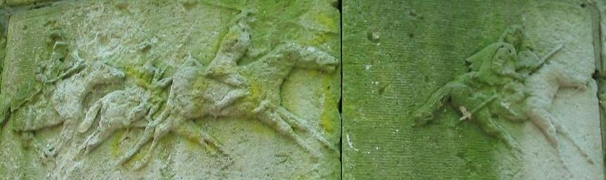 Jaxa von Köpenick, Relief am Jaczo-Turm (Ausschnitt 2), Berlin-Gatow